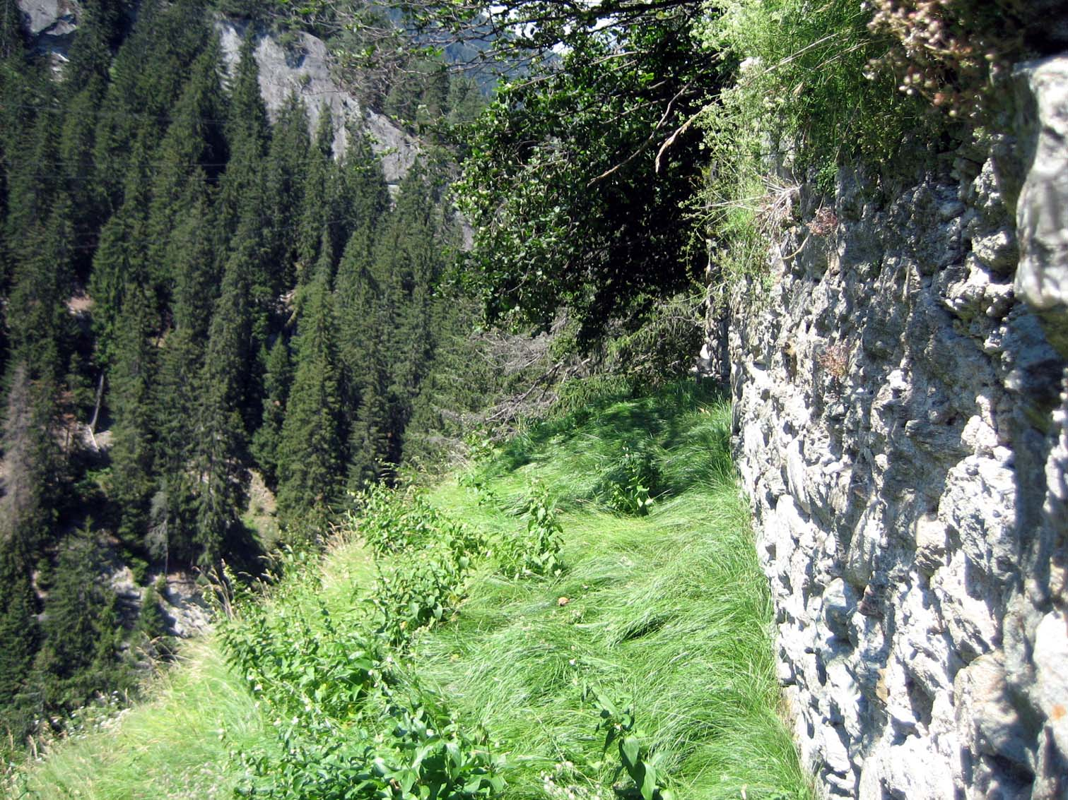 Westmauer